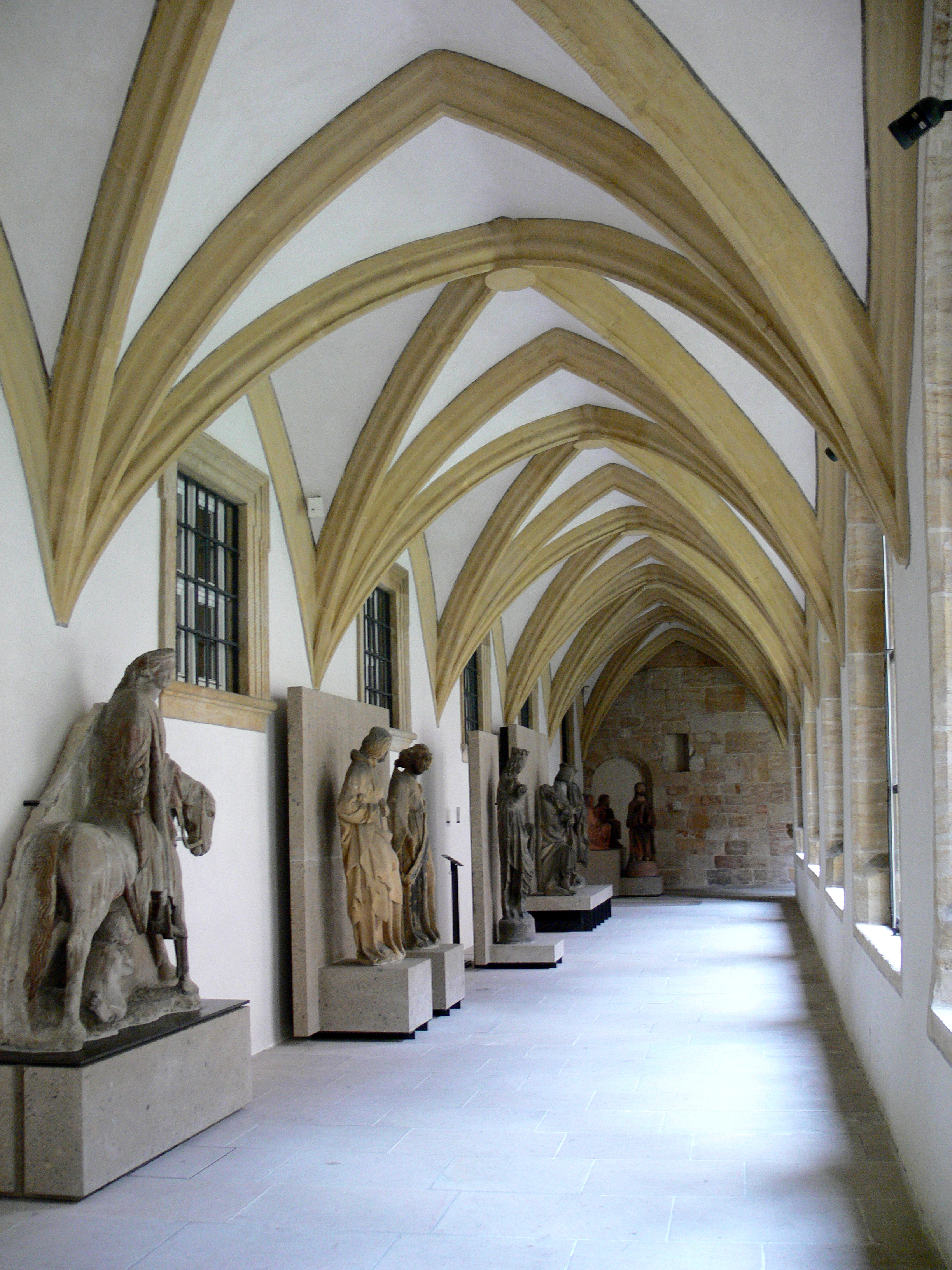 Diözesanmuseum Bamberg Kreuzgang